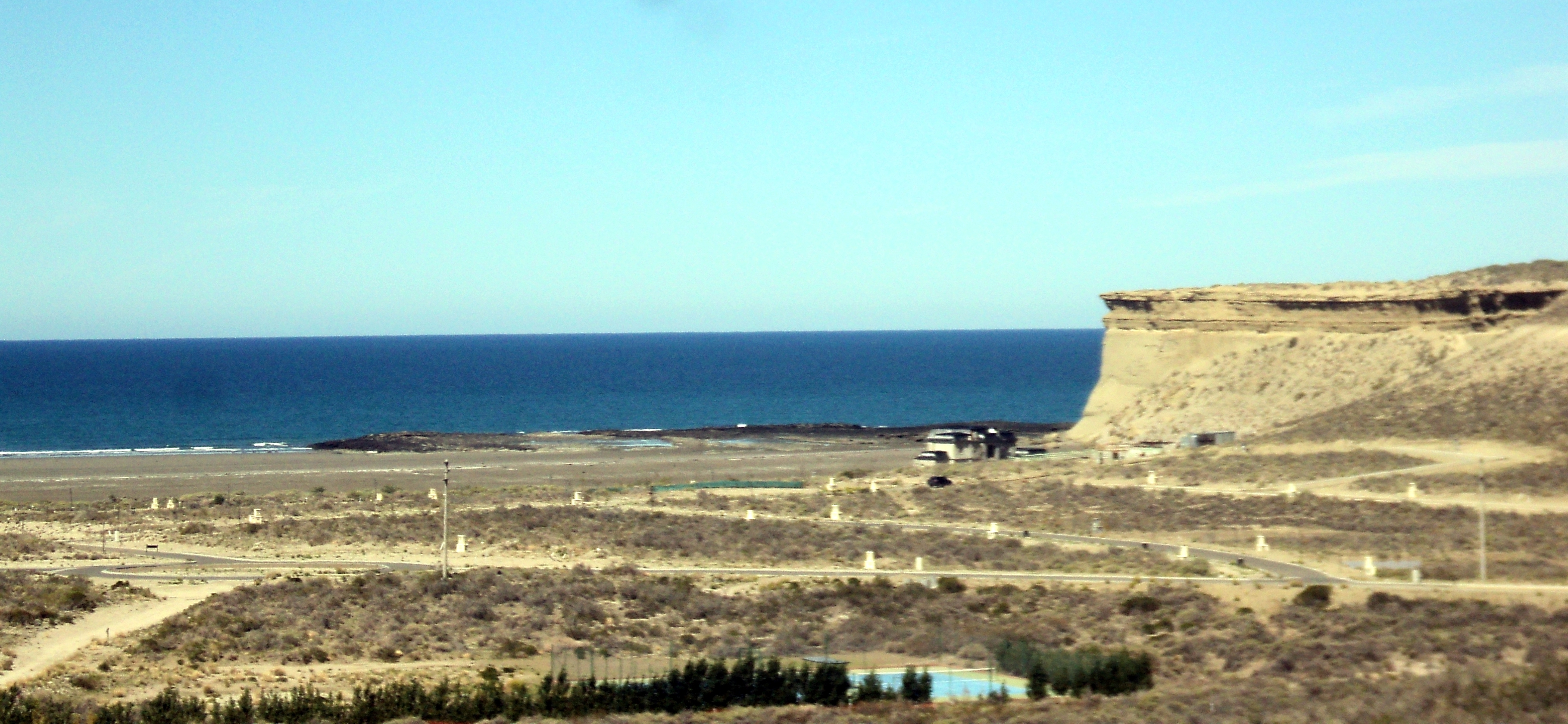 Vista de la playa desde el ingreso al country